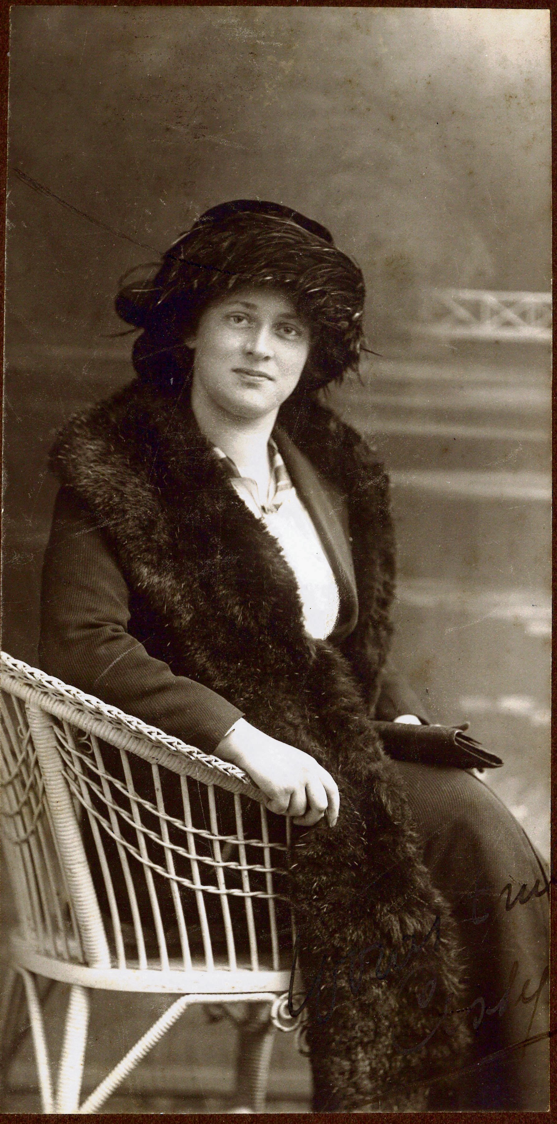 Cissy van Marxveldt, begin jaren twintig, als jonge schrijfster met al enige faam. Pseudoniem van Setske de Haan (Oranjewoud, 24 november 1889 – Bussum, 31 oktober 1948).